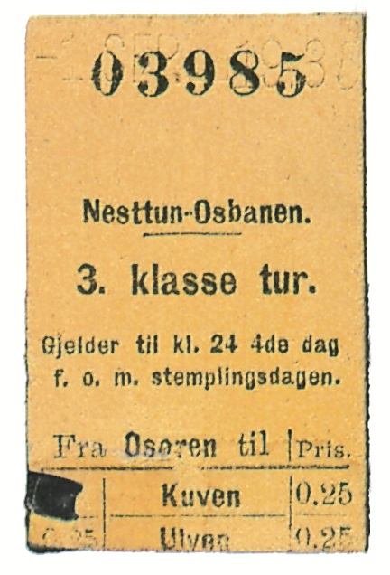 Billett til den siste turen med Nesttun-Osbanen